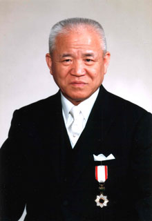 勲五等双光旭日章受章記念。田中国夫73歳。